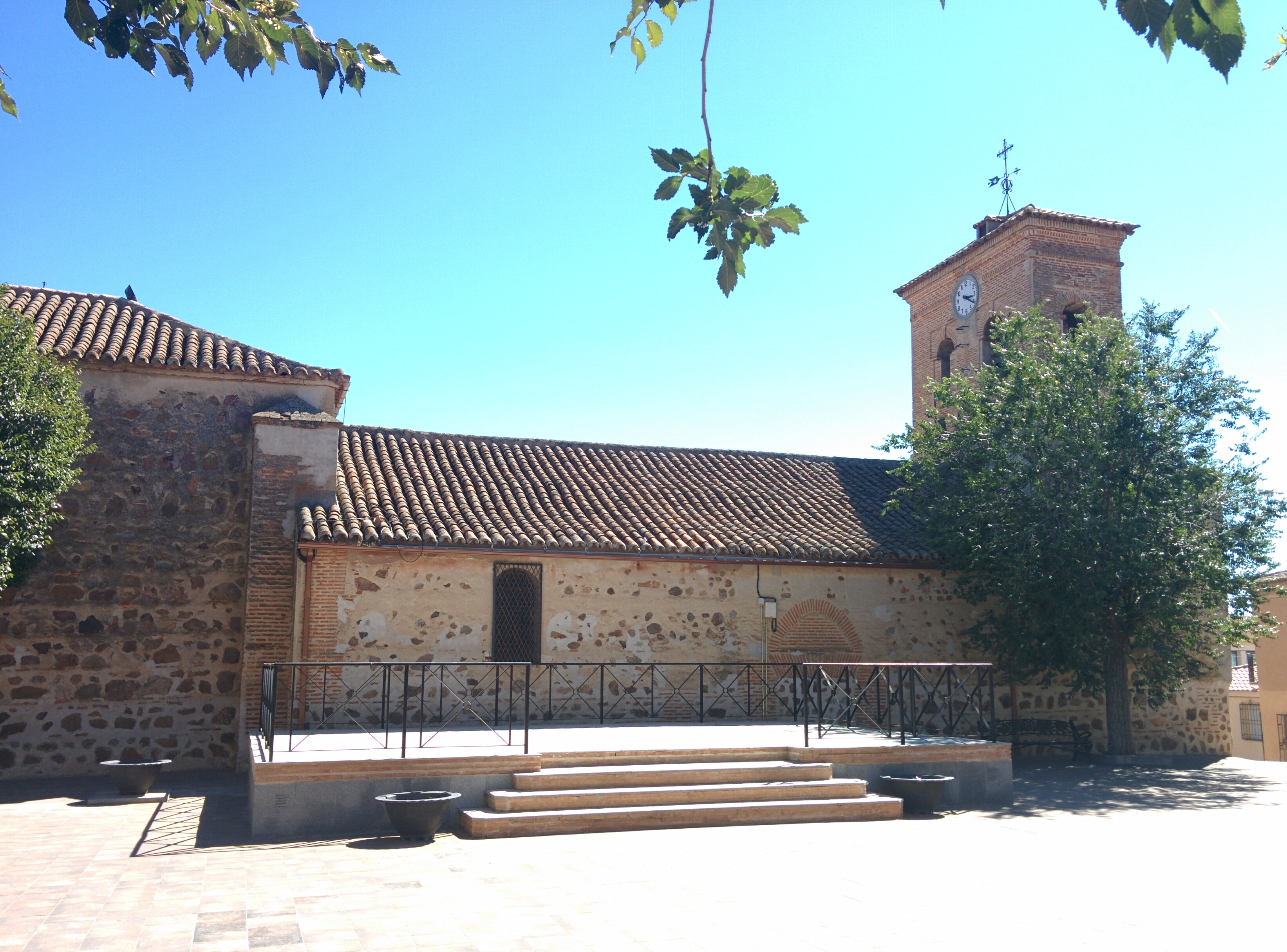 Iglesia de San Juan Bautista, en Marjaliza (Toledo, España).